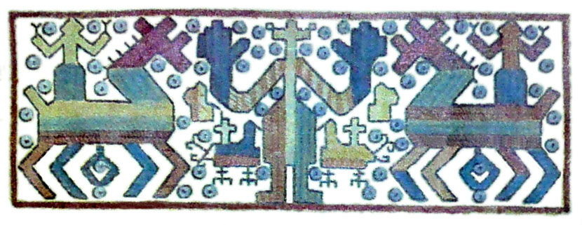 Узор с калужской вышивки. Из фондов Белгородского музея народной культуры.